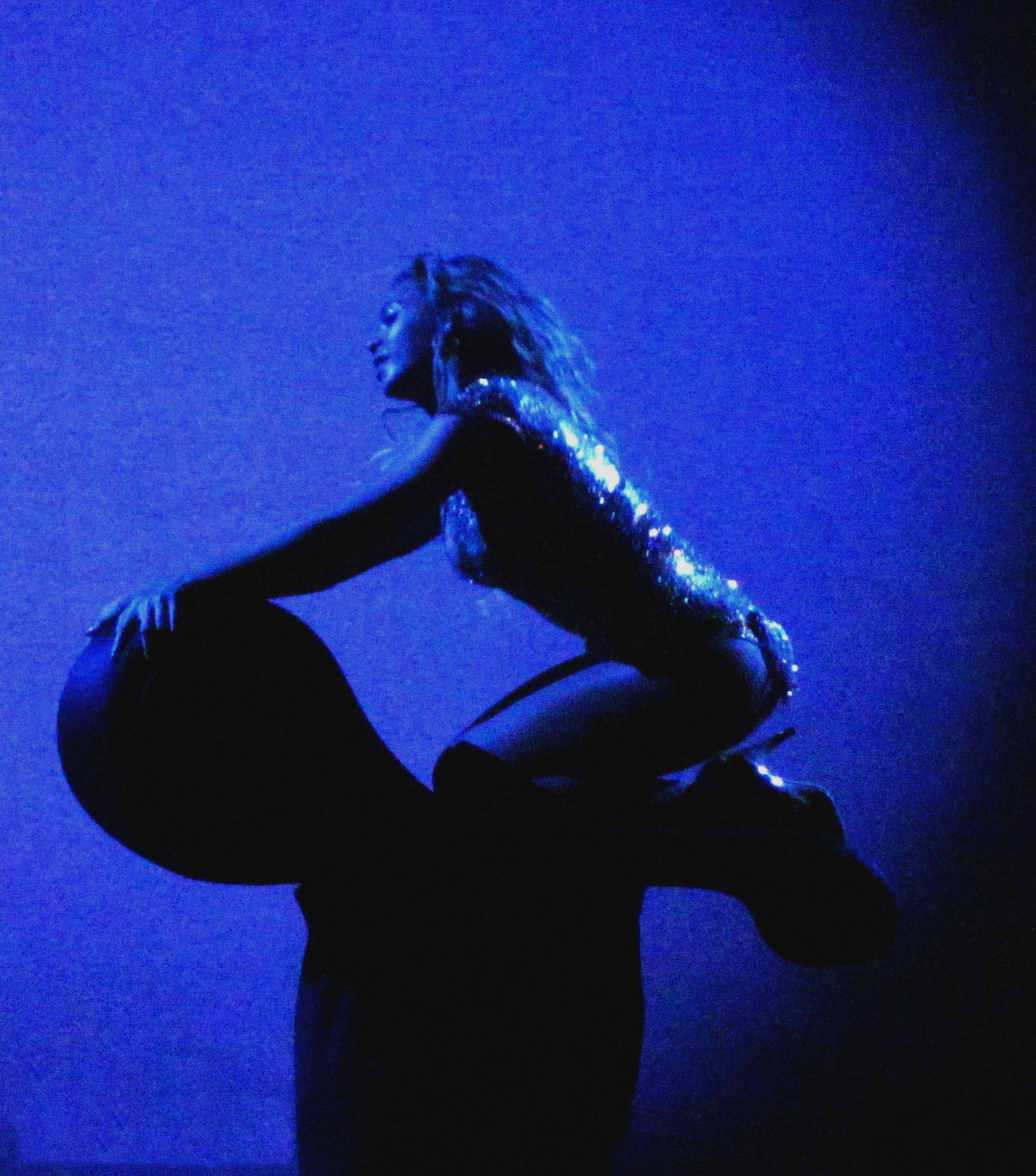 Beyonce en el The O2 Arena durante su tour The Mrs. Carter Show World Tour en Londres